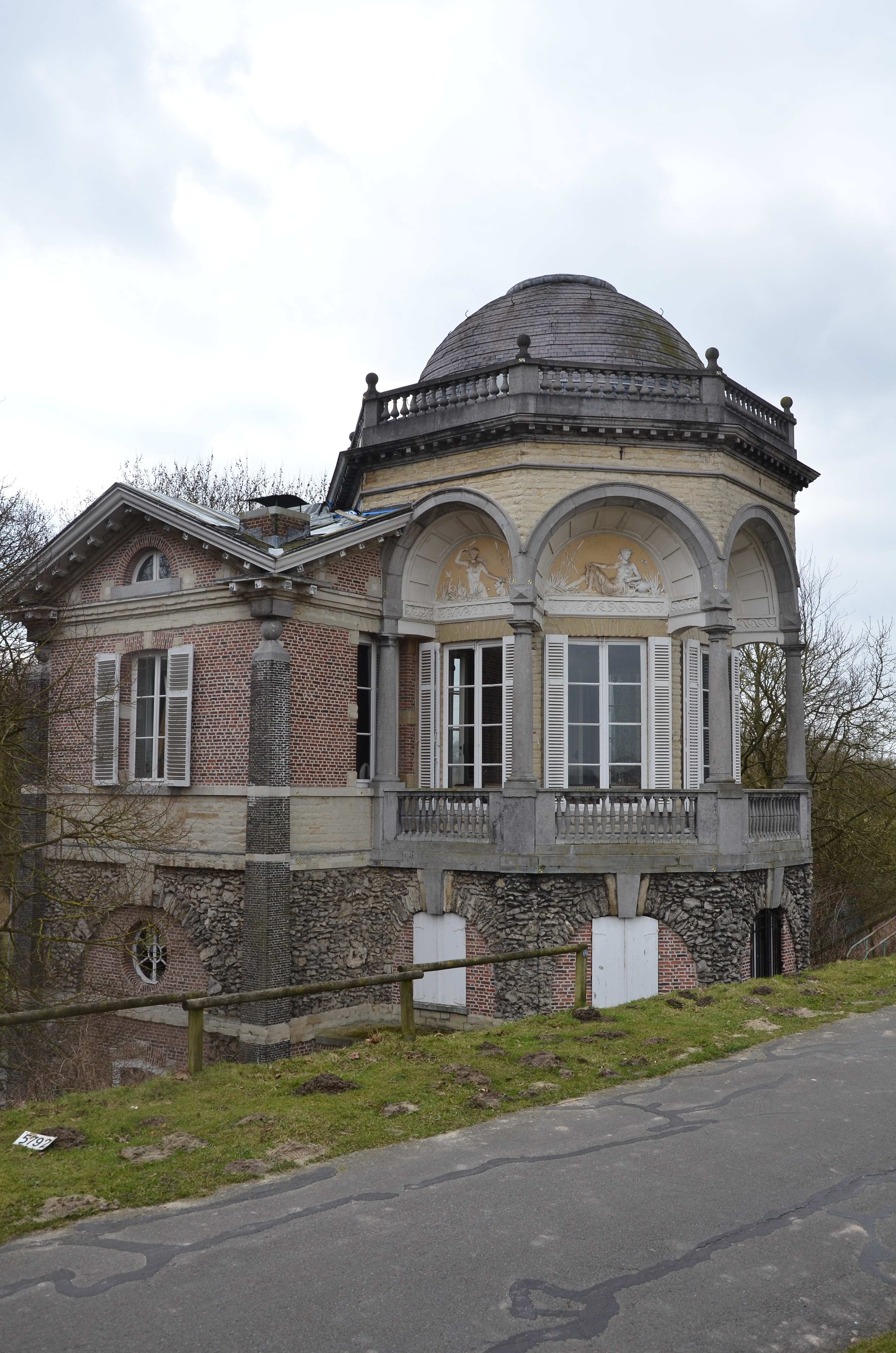 Paviljoen De Notelaer